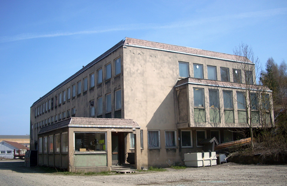 Et av Det Norske Nitridaktieselskaps bygg på Eydehavn, Arendal